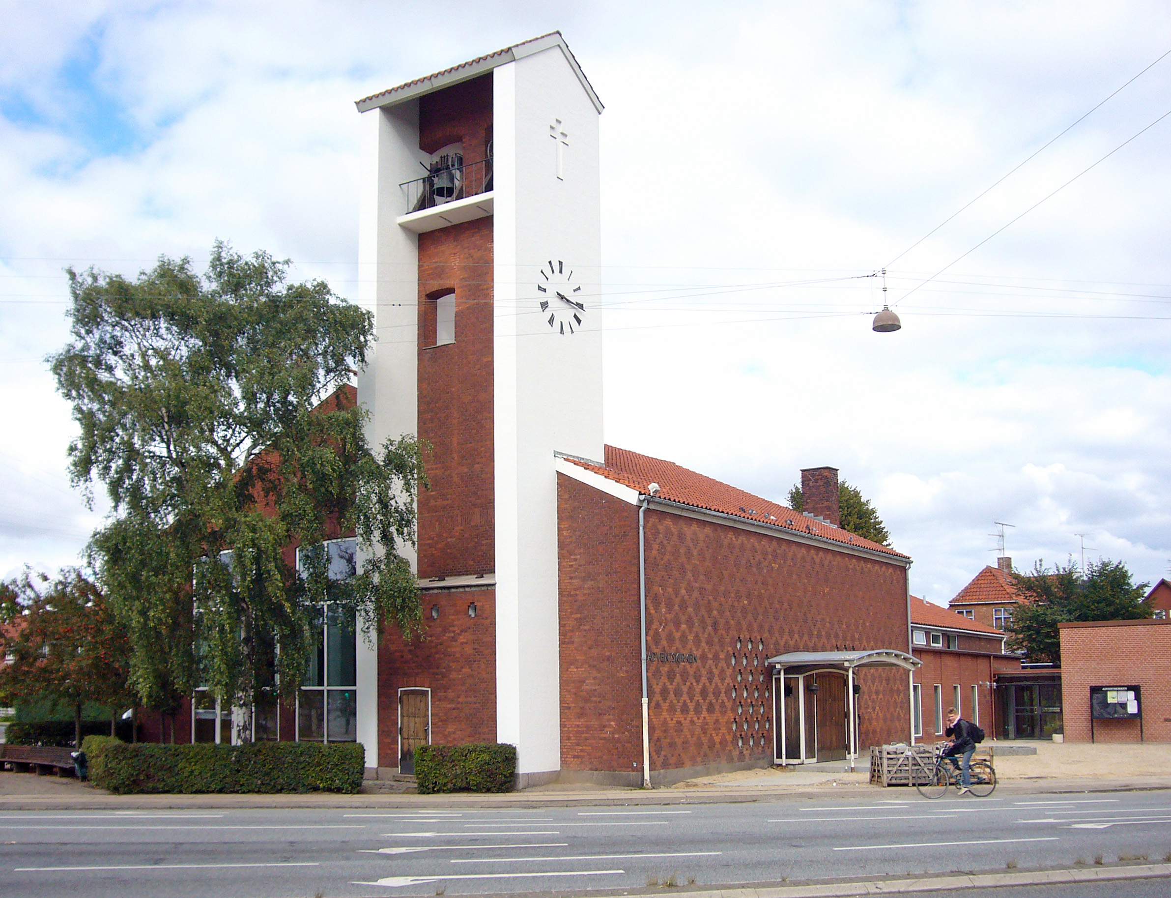 Adventskirken, Vanløse, Copenhagen, Denmark. Adventskirken